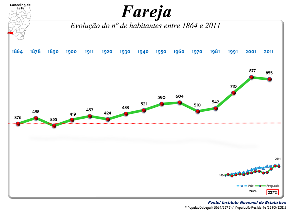 Censos 1864/2011